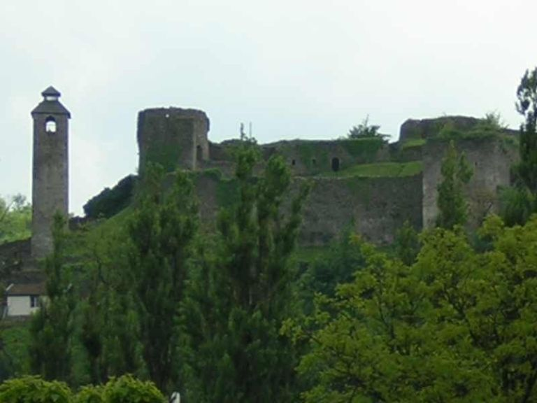 Maglajska tvrđava